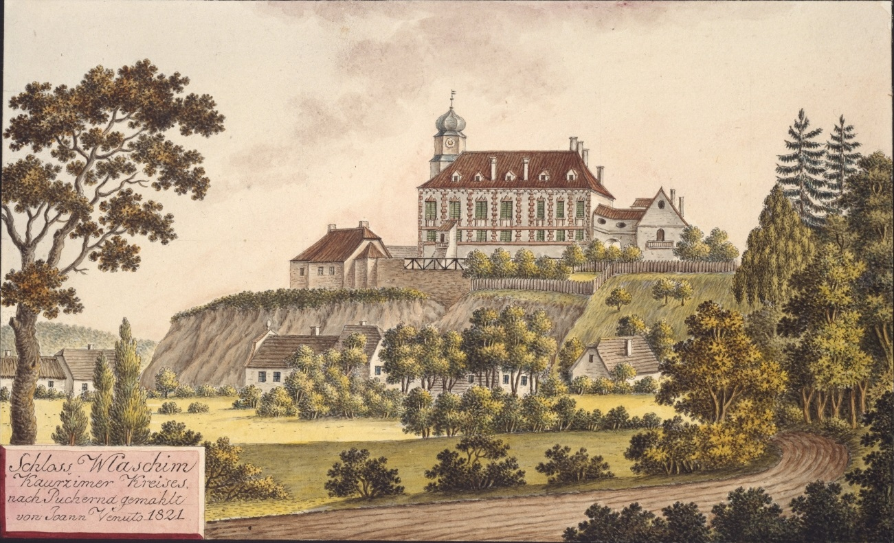 Zámek Vlašim. Schloss Wlaschim Kaurzimer Kreises nach Pucherna gemahlt von Joann Venuto 1821